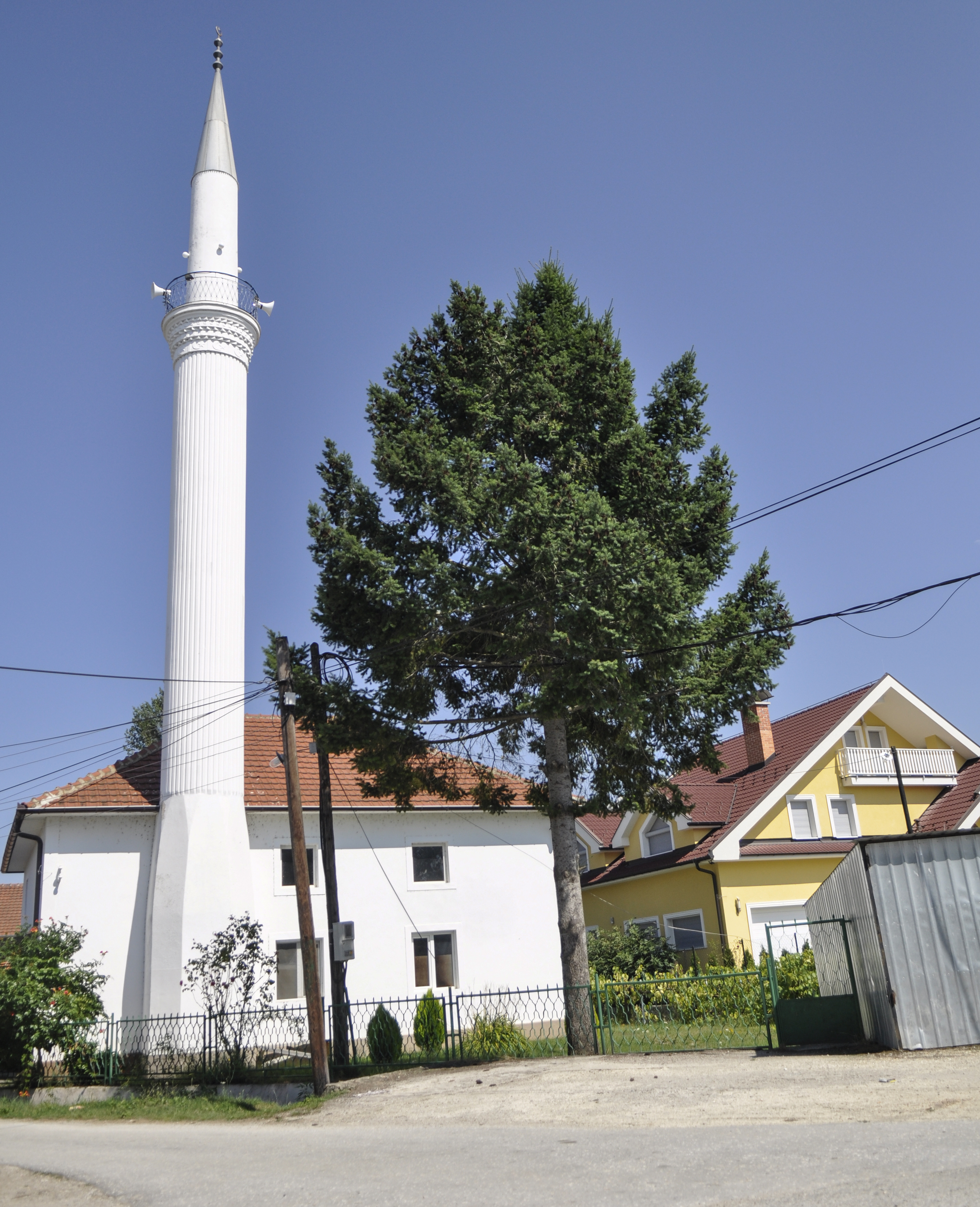 Џамија во Биџево